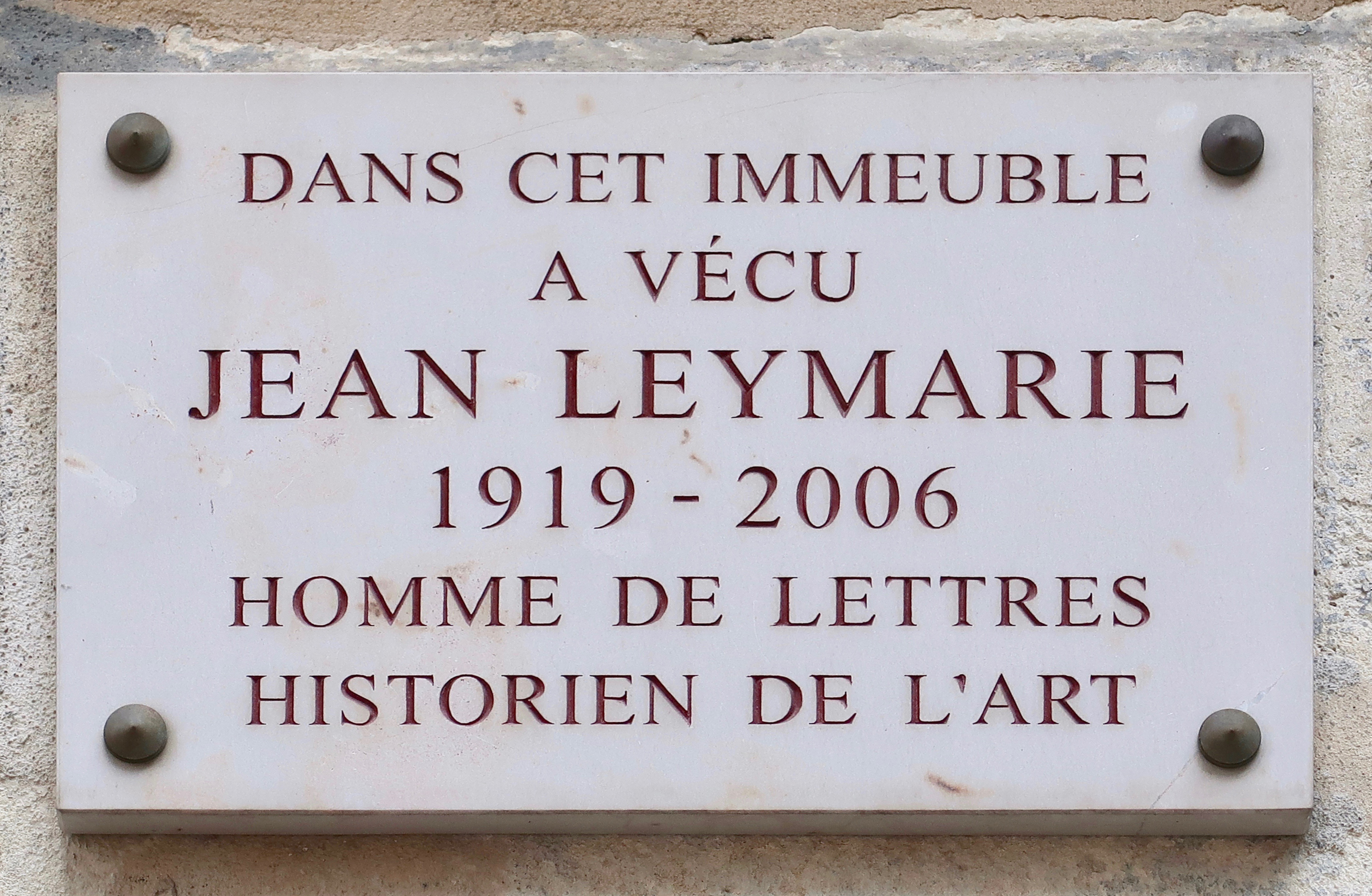 Plaque en hommage à l'historien d'art Jean Leymarie, 16 rue du Cloître-Notre-Dame (Paris, 4e).